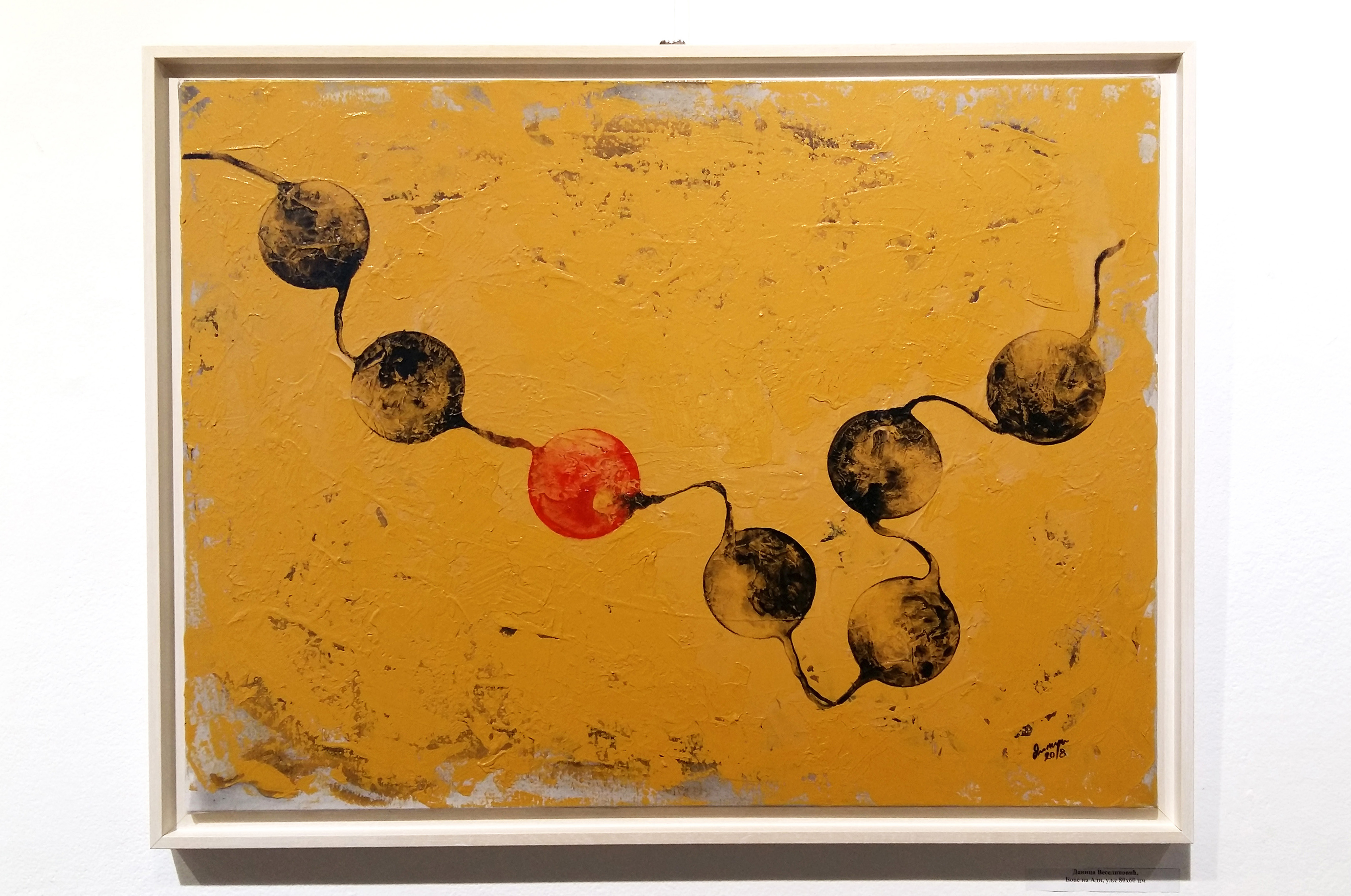 Бове на Ади, Комбинована техника, 2018. 80 х 60 цм, уметничко дело аутора Данице Веселиновић Лиценцирање Template:Za ostavu